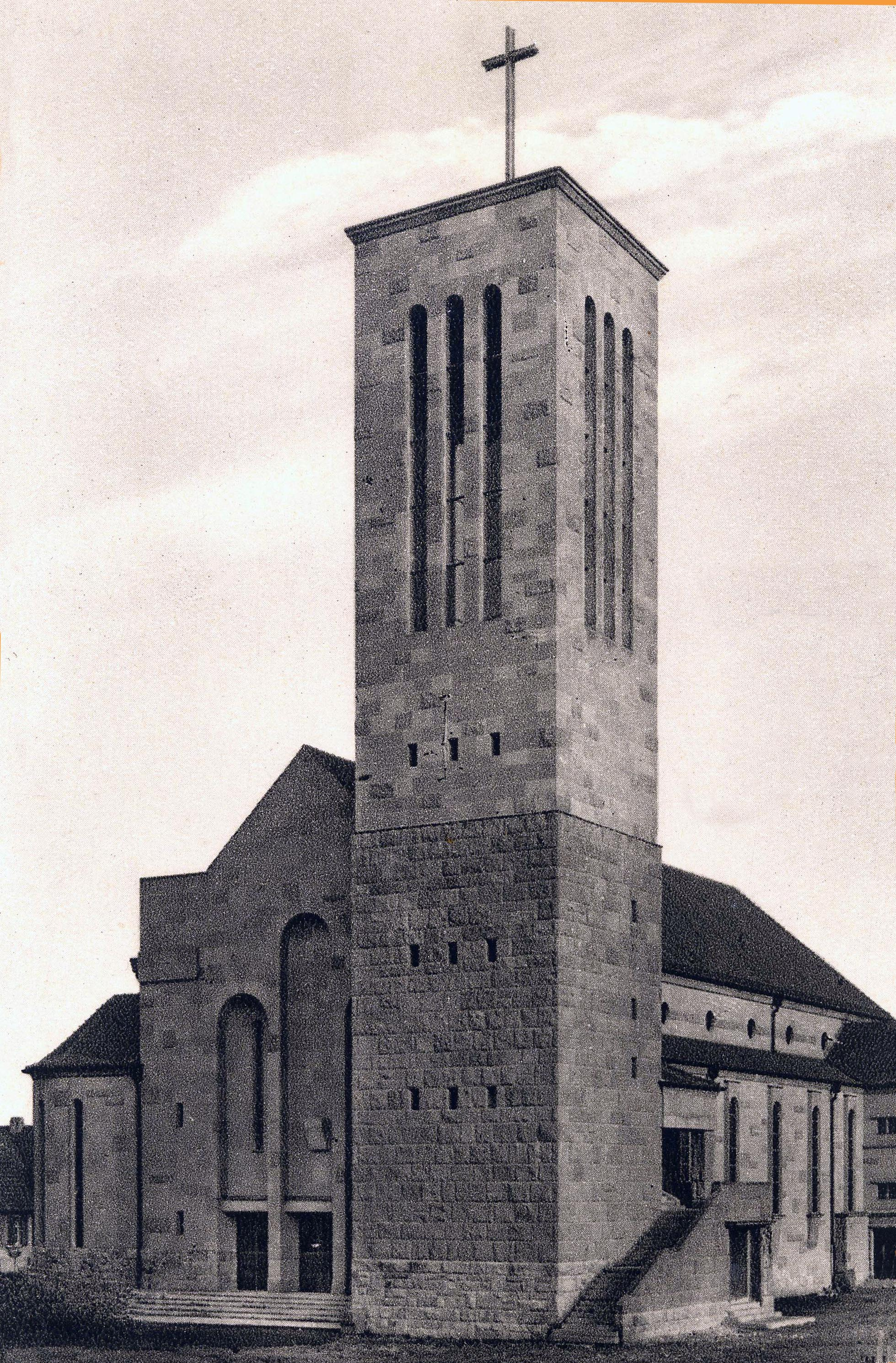 St. Elisabeth, Rheine - Süd-Westseite vor 1944